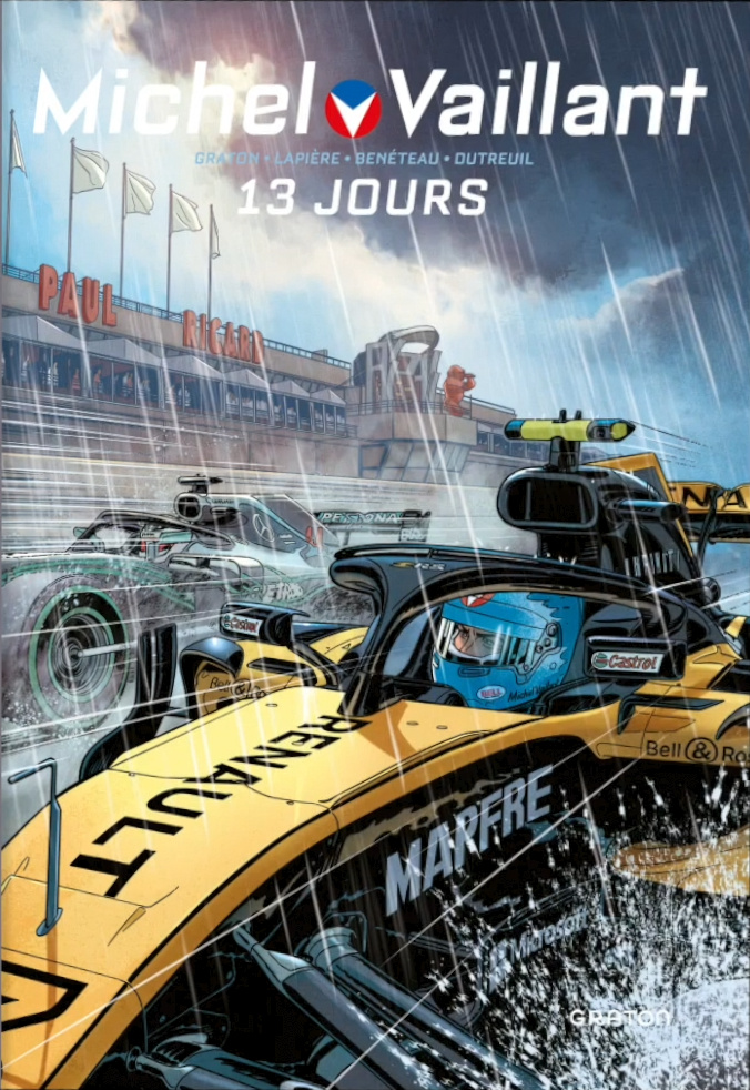 Couverture de l'album Michel Vaillant - 13 jours (Nouvelle saison, tome 8)